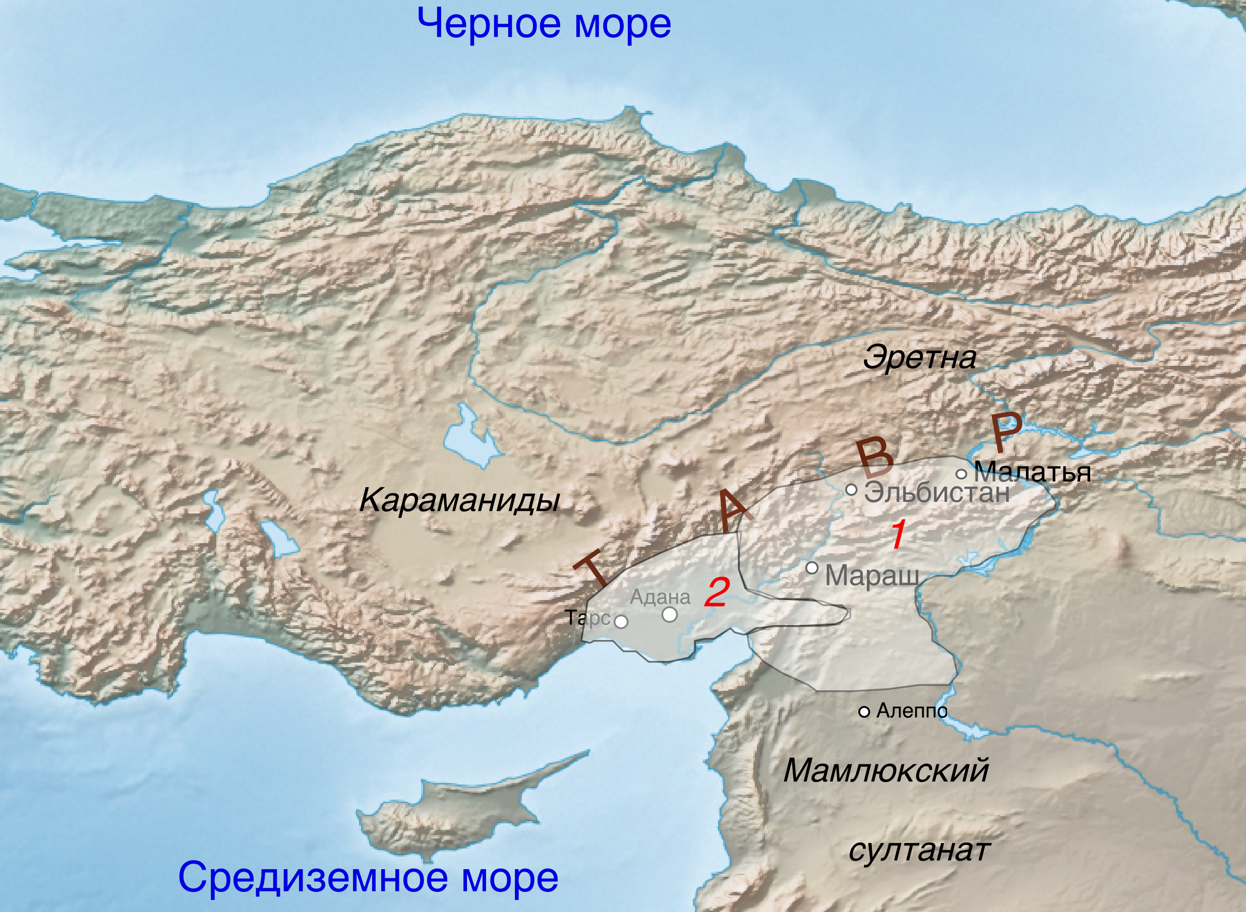 Территории буферных бейликов Дулкадирогуллары (1) и Рамазаногуллары (2)